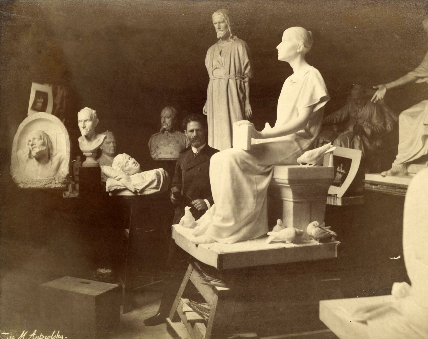 Mark Antokolski in his Paris studio.